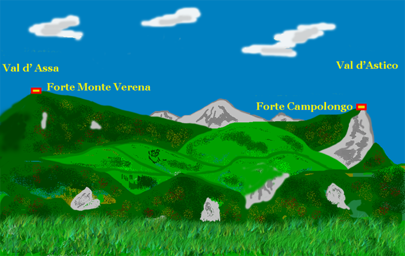 Blick von den k.u.k. Festungswerken auf die italienischen Forts Monte Verena und Campolongo